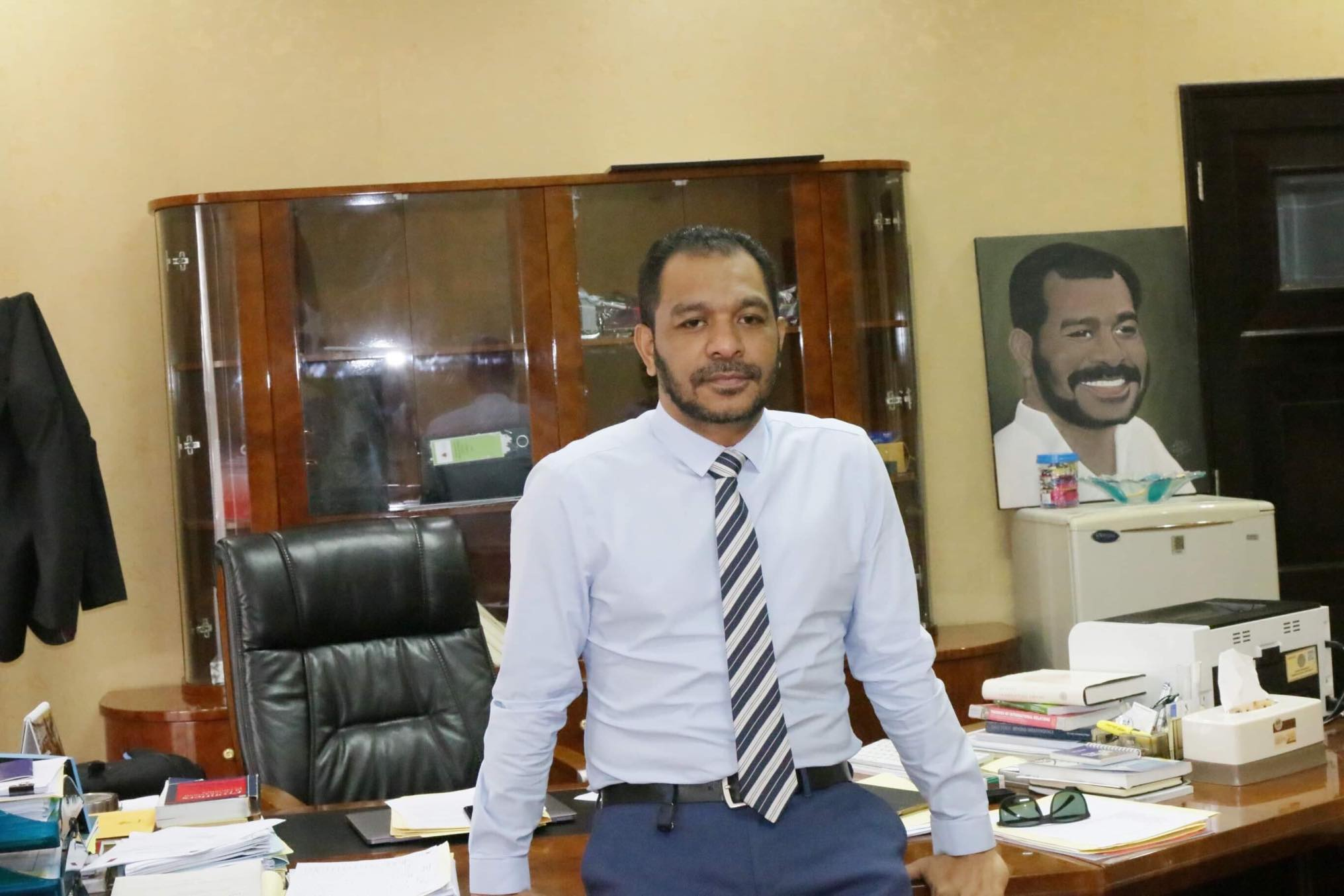 Fidelis Leite Magalhães, osttimoresischer Minister